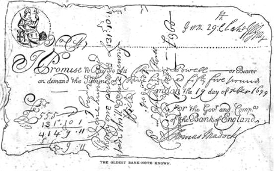 Reproduction par photogravure du plus ancien billet émis par la Bank of England, le 19 octobre 1699, pour un montant de 555 £. Cette image servit à illustrer un article de Gilbert Guerdon intitulé « Bank of England Notes », publié dans The Strand Magazine n°44, page 211.